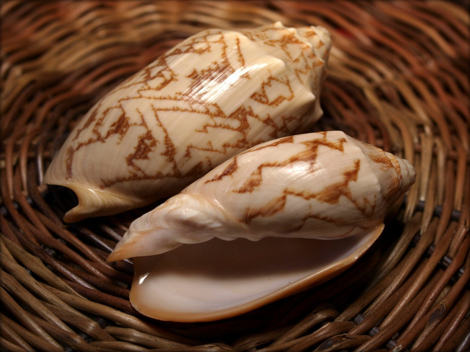 Fledermauswalze — engl.: Bat Volute Philippinen: Kibol Cymbiola vespertilio wird in den Philippinen kommerziell befischt und auf Märkten angeboten.